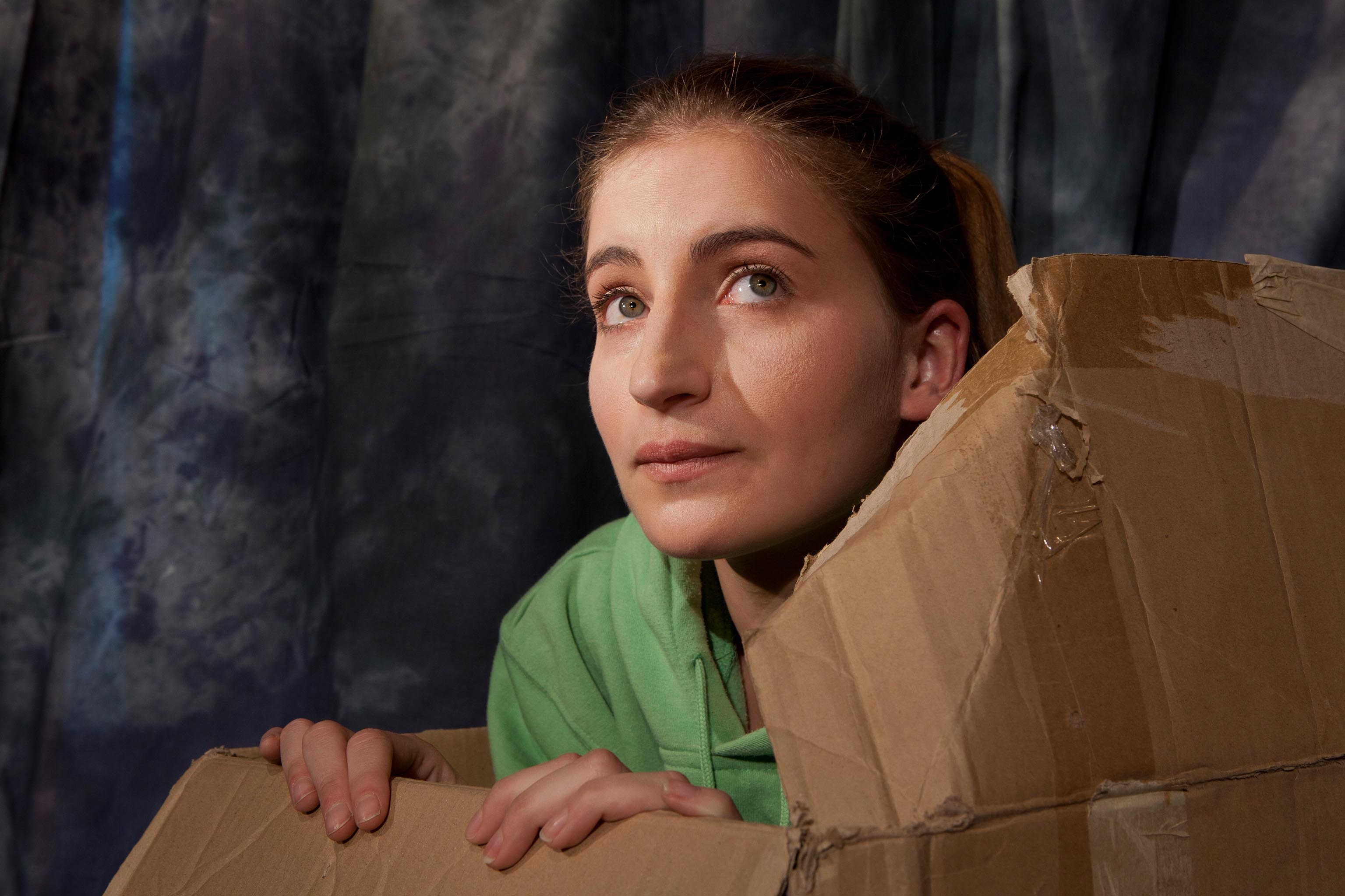 הילה מצקר-הלוי בהצגה "בגדי חורף אבא", פרי עטו של משה פרסטר, ובבימויה של הדס גלבוע, 2012